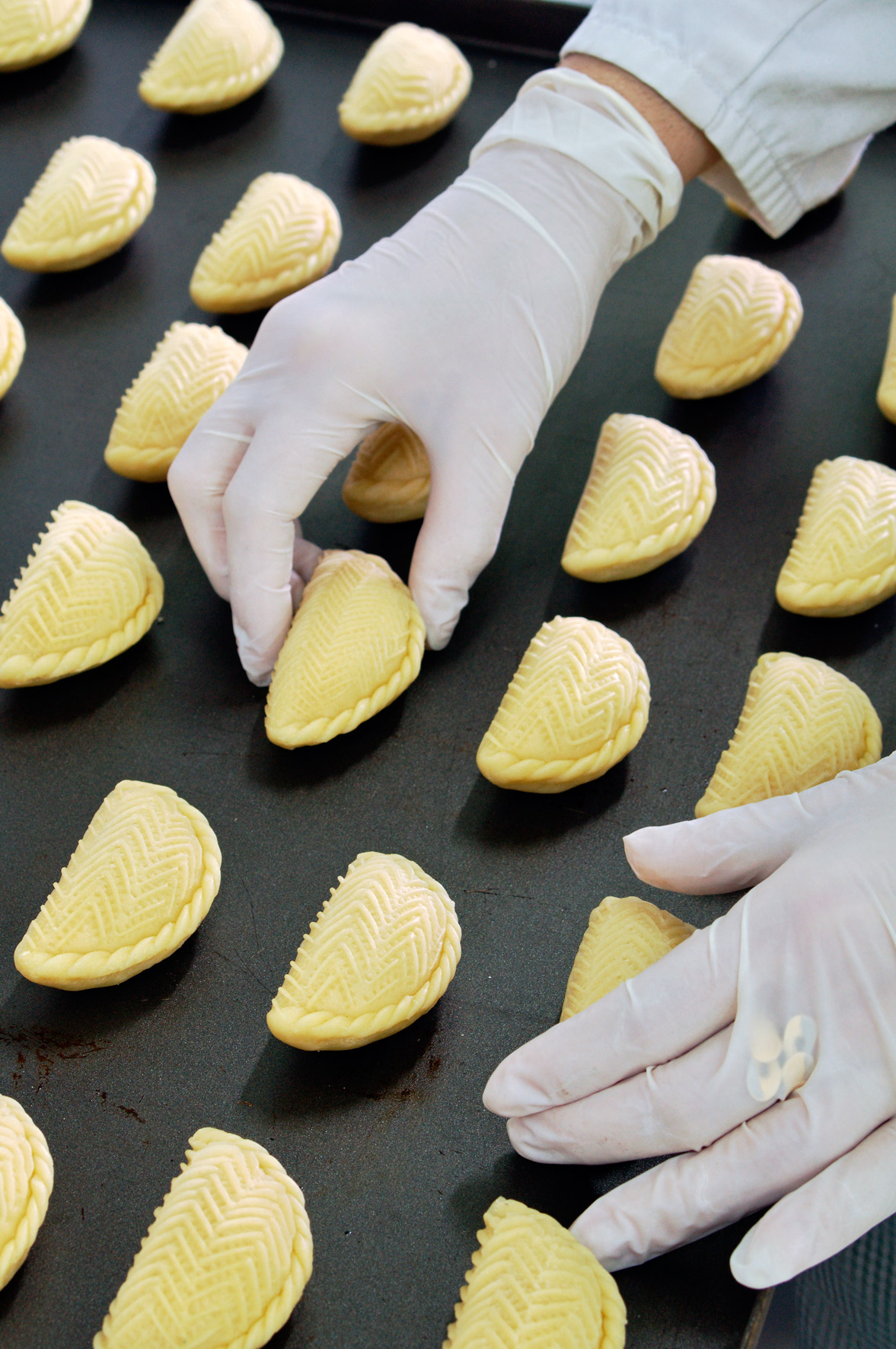 Выпечка шекербуры в ресторане.